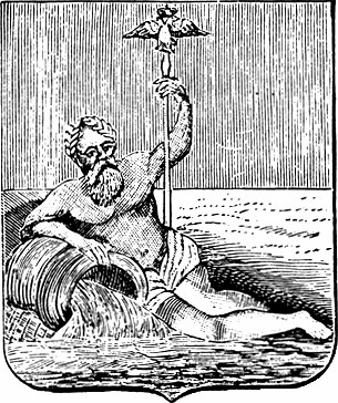 Герб города Олешки